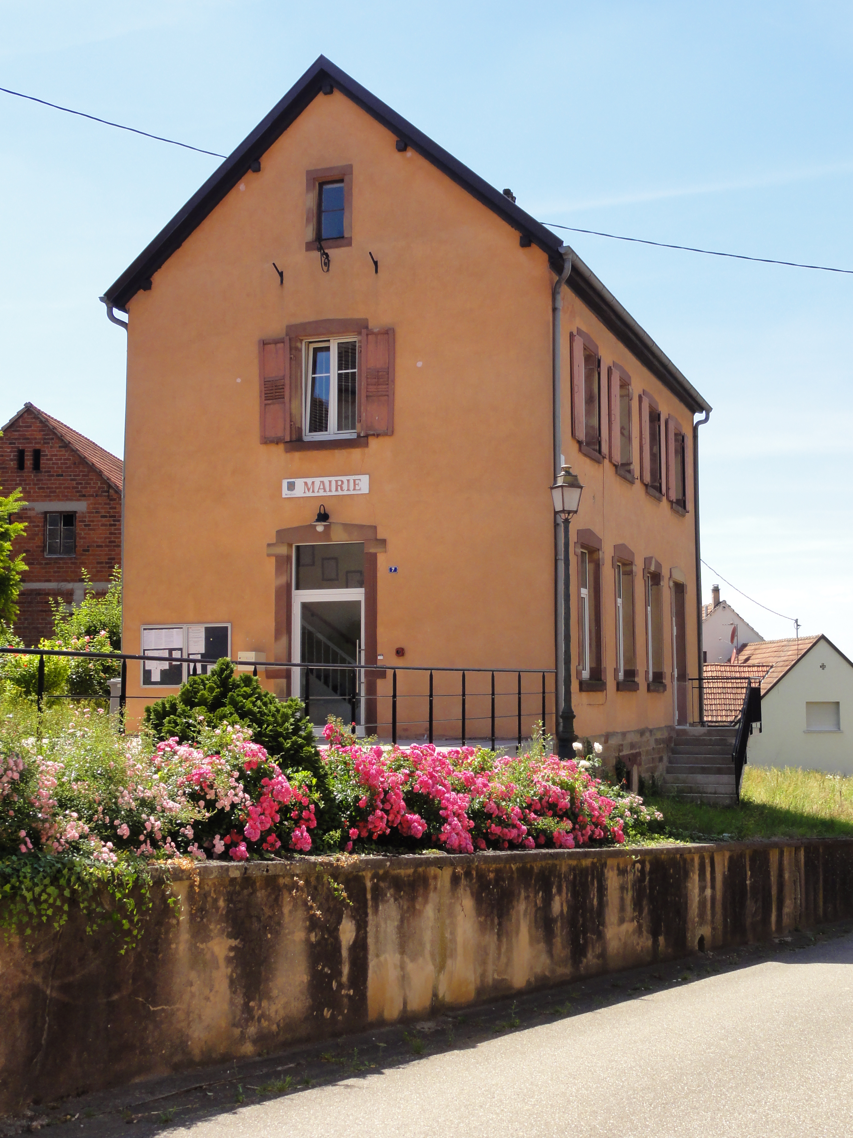 Alsace, Bas-Rhin, Rottelsheim, Mairie.